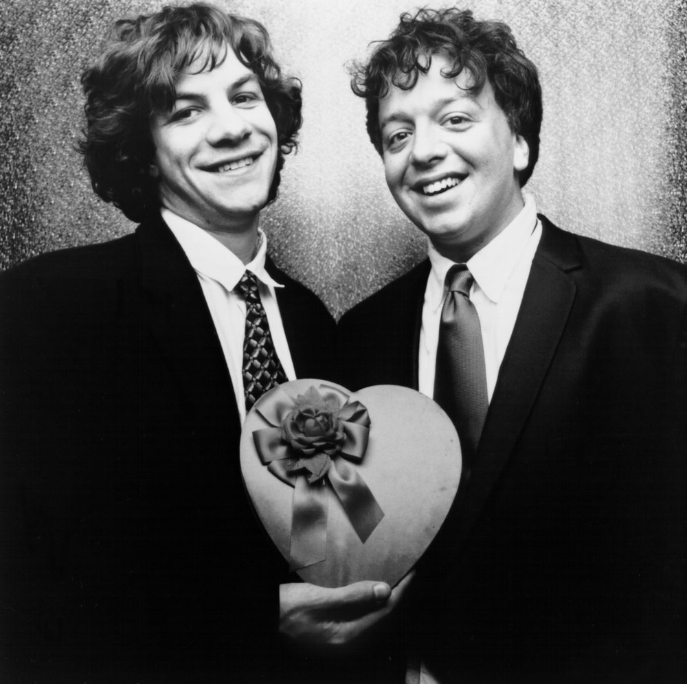 Ween spiller i en konsert